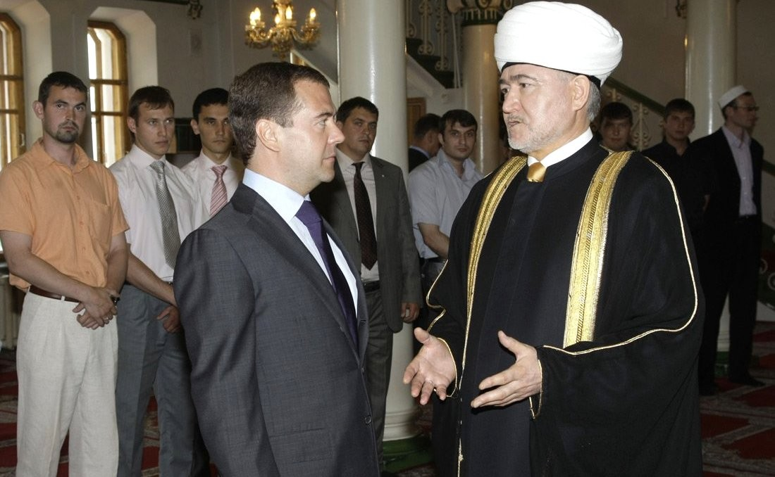 Равиль Гайнутдин